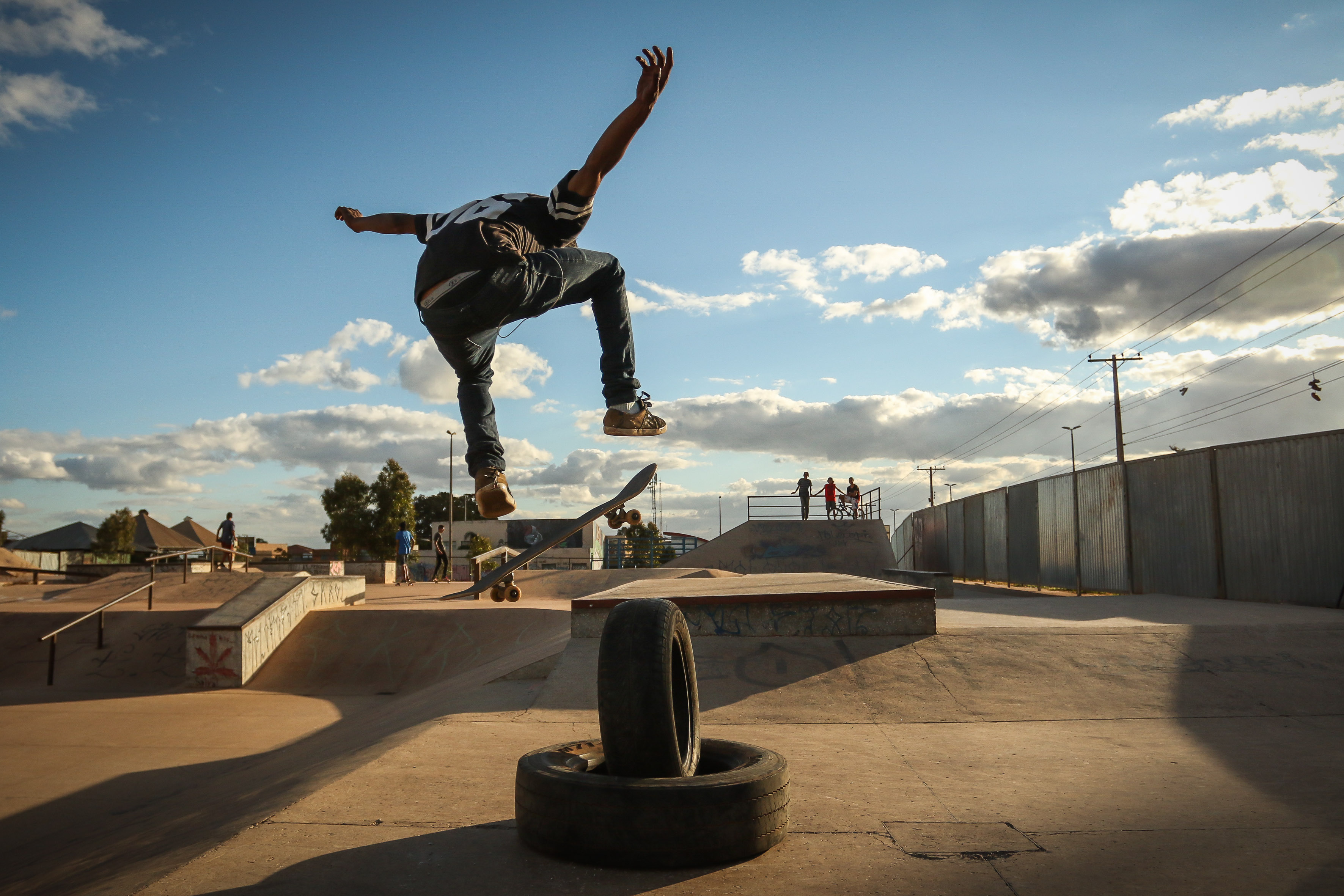 Quadra 206/300, Recanto das Emas, DF, Brasil, 18/7/2015 Foto: Andre Borges/Agência Brasília Jovens aproveitam o Skate Park para treinar manobras. A pista de skate, no Centro Urbano, próximo da Quadra 206/300 do Recanto das Emas, tem 2 mil metros de área construída e é uma das maiores do Distrito Federal.